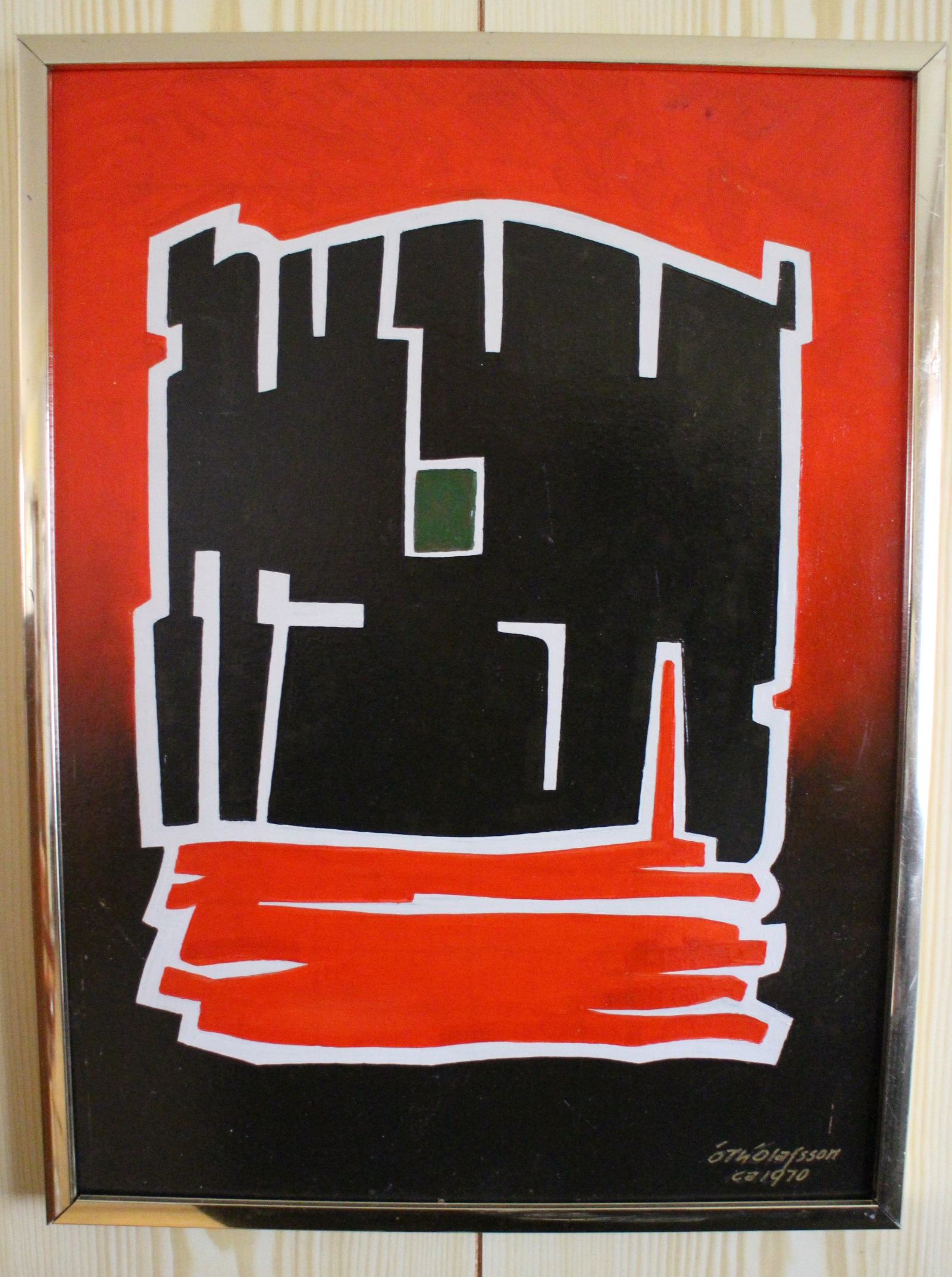 Málverk eftir Ólaf Th Ólafsson